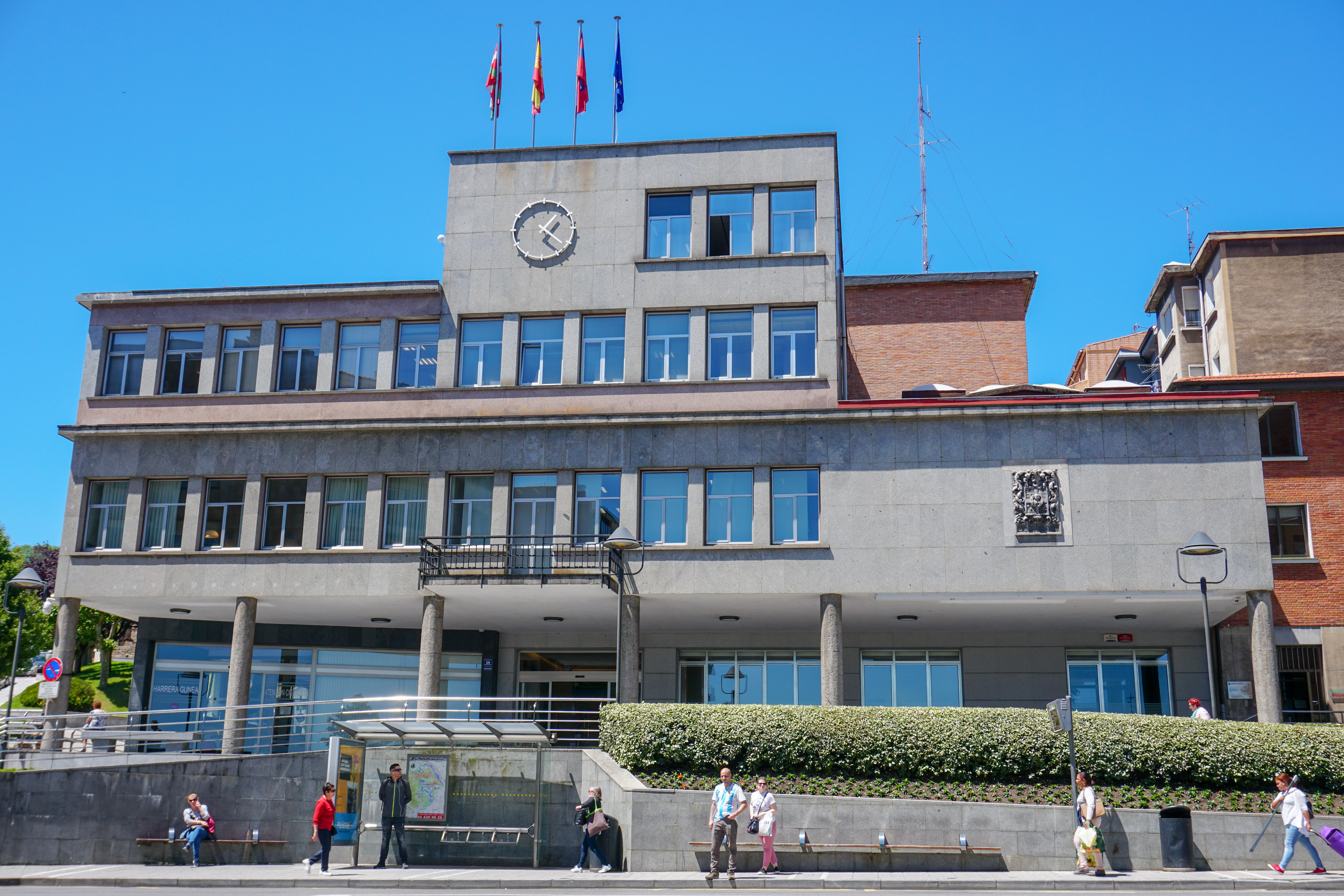 Casa consistorial de Basauri